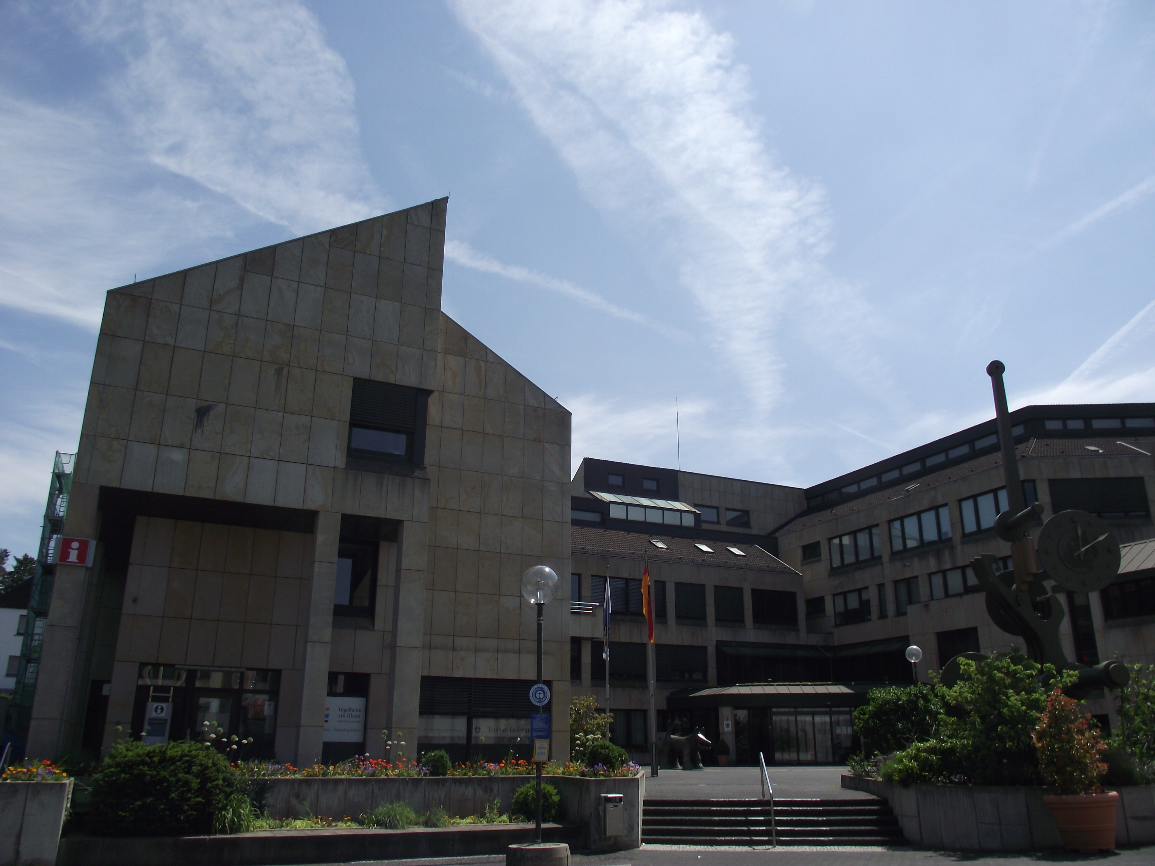 Neues Rathaus am Neuen Markt in Ingelheim im Mai 2012. Seit 1982 als Rathaus am „neuen Markt“ genutzt. Davor war der Sitz der Stadtverwaltung das alte Rathaus in Nieder-Ingelheim. Das Neue Rathaus wurde im Zuge der Umgestaltung des Neuen Marktes bis Ende 2017 erweitert und modernisiert.